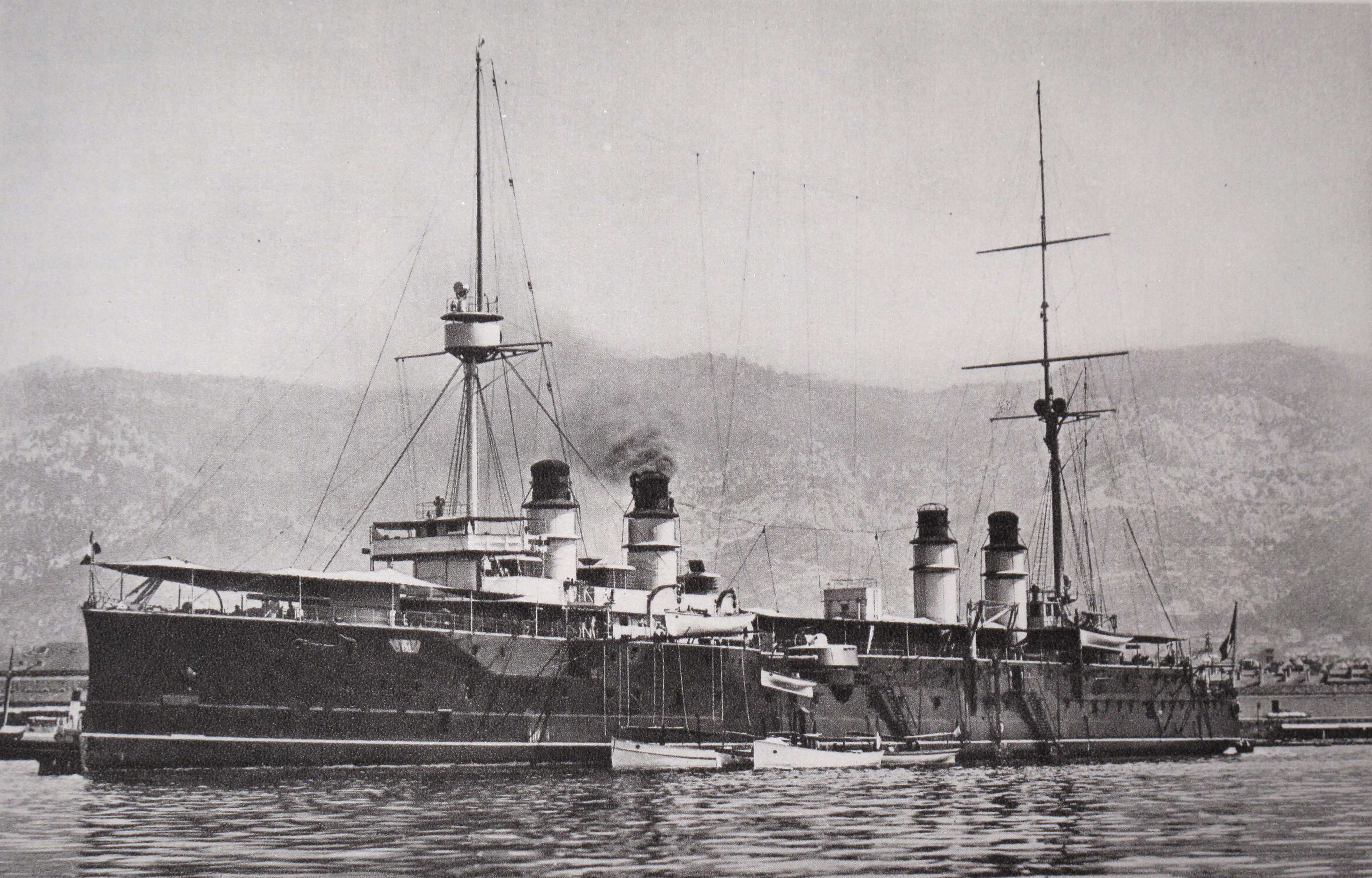 French cruiser Kléber